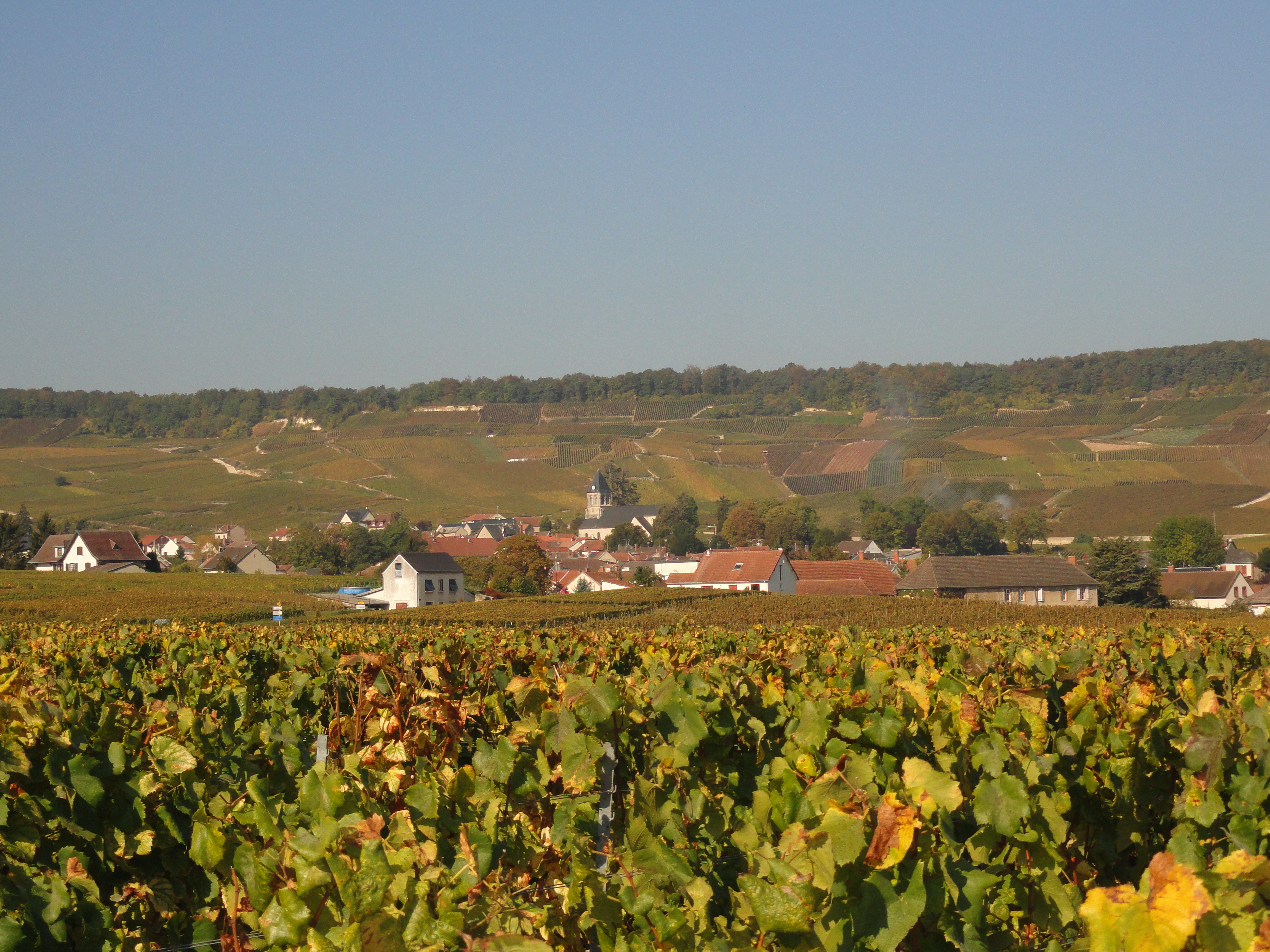 Vue du centre d'Oger depuis un chemin de vigne entre Le Mesnil et Avize